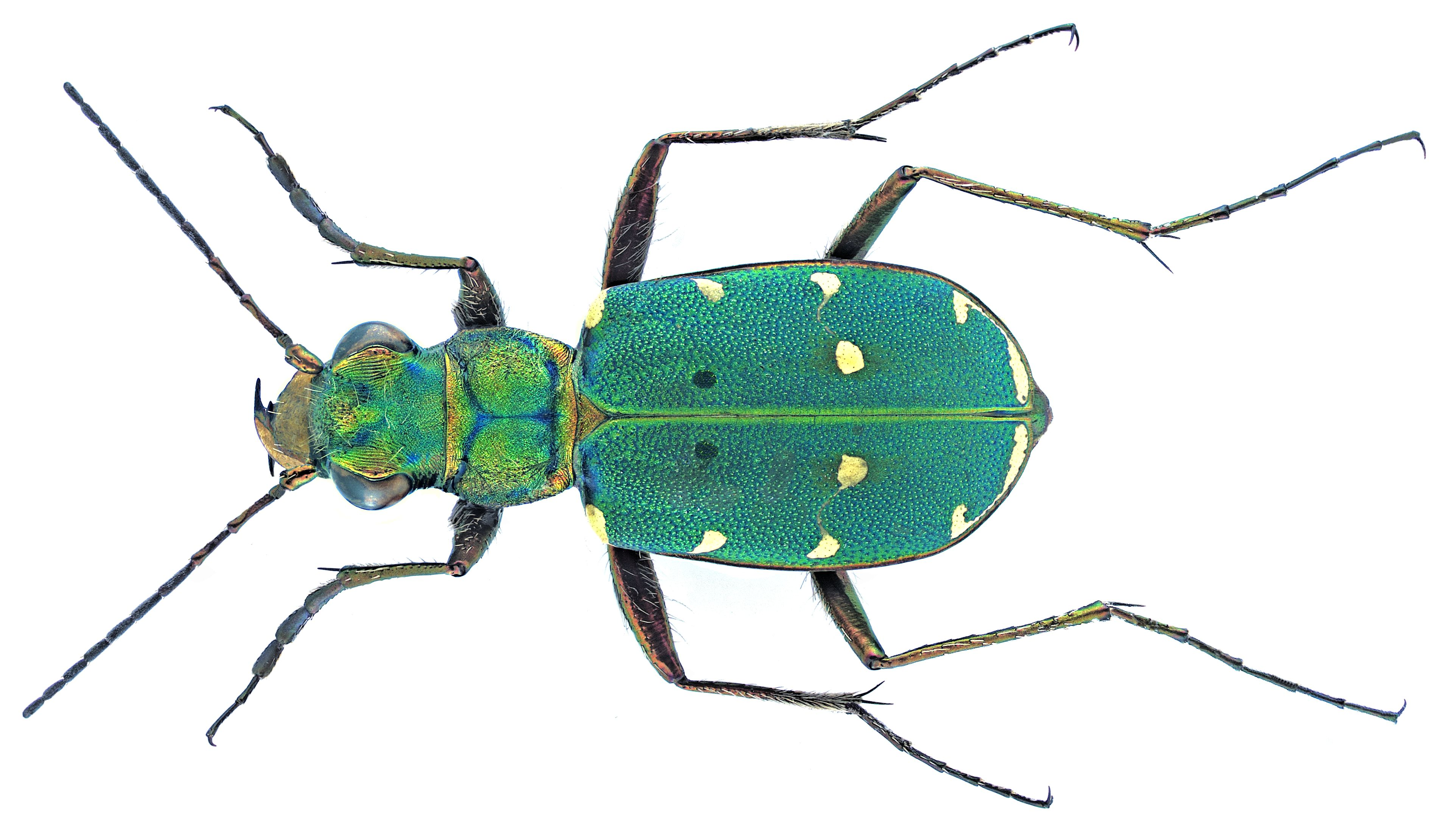 Familie: Carabidae Größe: 10,5-14,5 mm Verbreitung: Europa, Nordafrika, Nordwestasien Ökologie: auf Böden mit schütterer Bodenbedeckung Fundort: Kasachstan, Südaltai, Slavjanka leg. Lukhtanov, 1992; det. J.Gebert, 2005 Foto: U.Schmidt, 2008